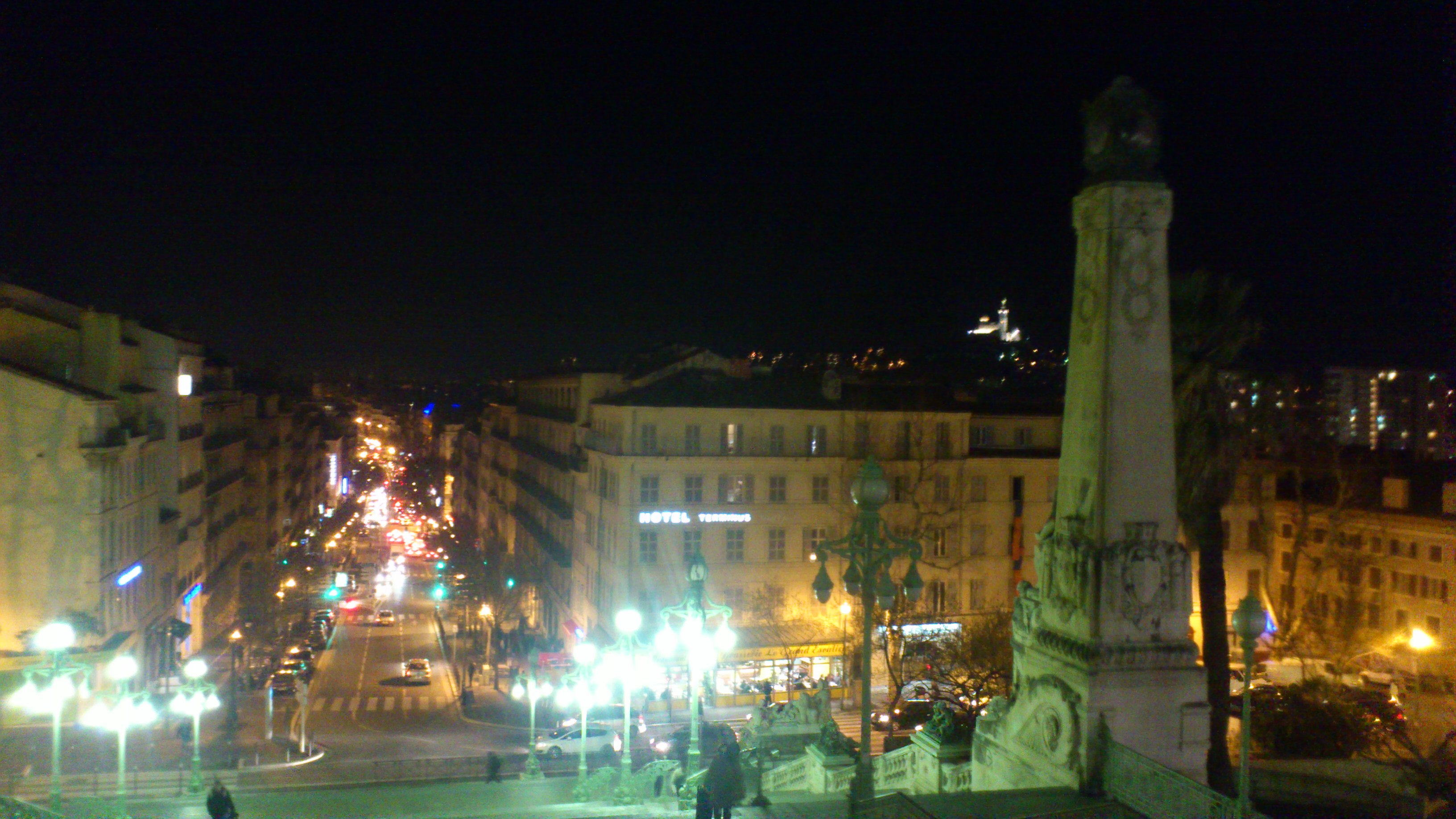 Mars 2013, 20h